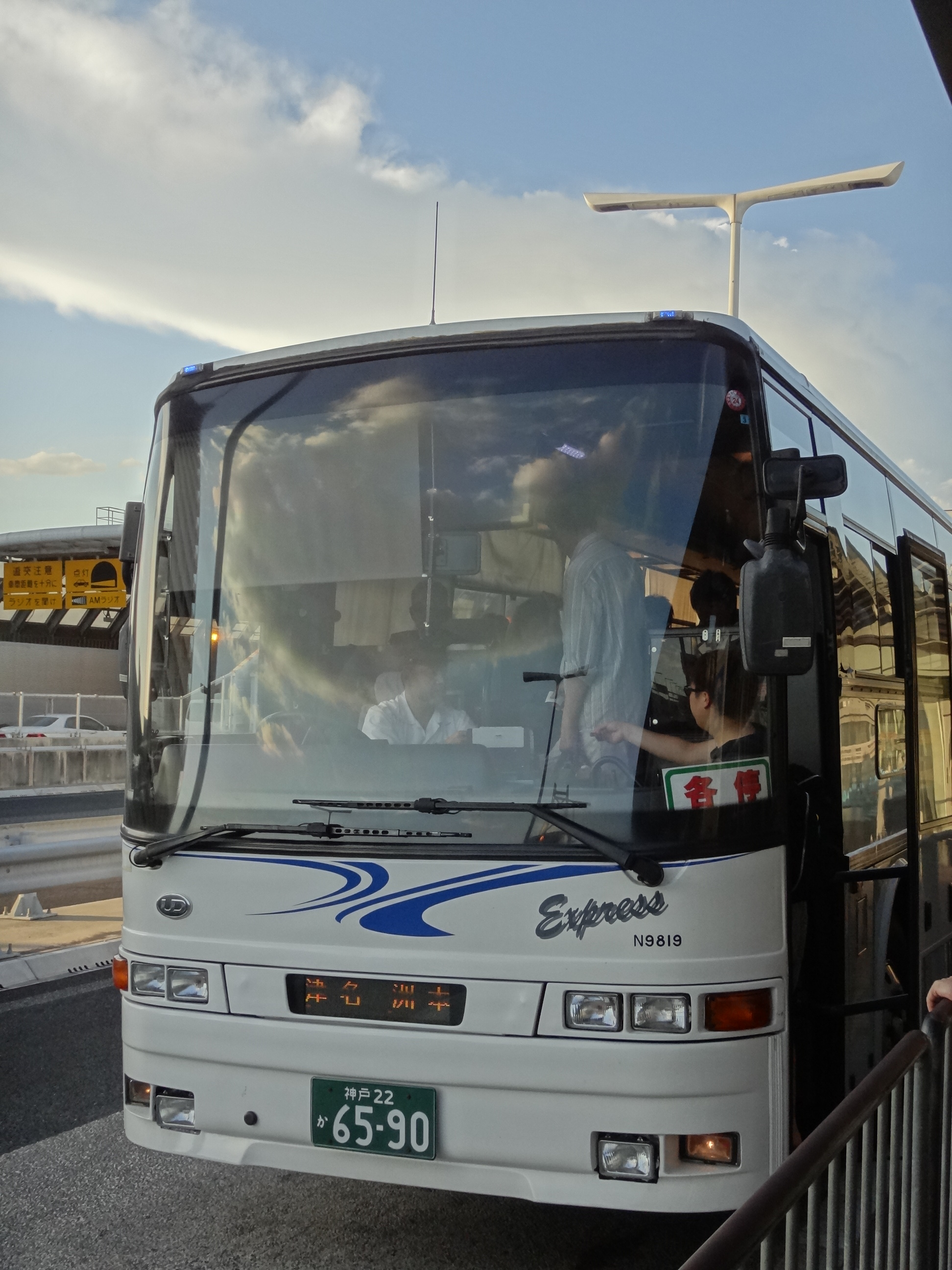 本四海峡バスのかけはし号で使用している日産ディーゼル・スペースアロー・ユーロツアー